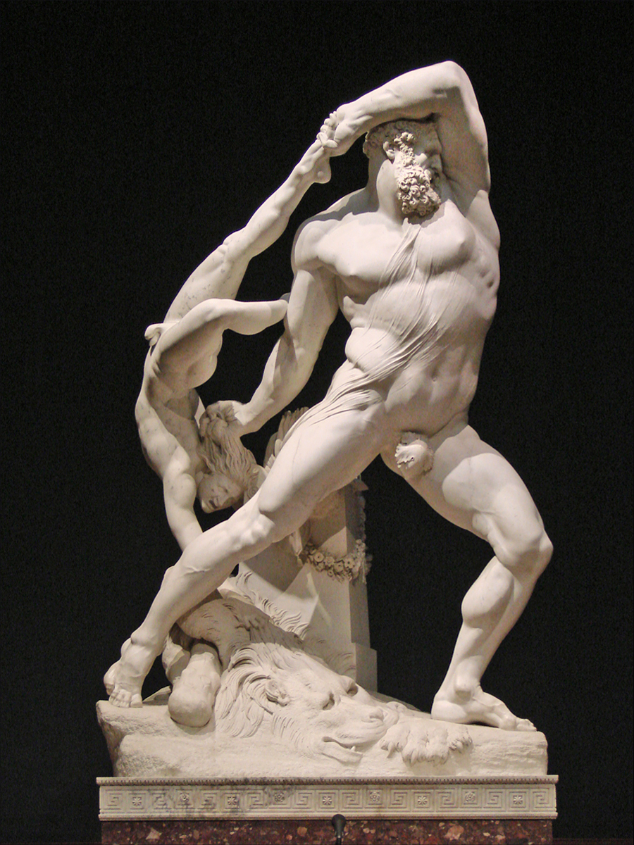 Sculpture d'Hercule et Lichas (Ercole e Lica, Hercules and Lichas) Canova, Antonio (1757-1822) oeuvre réalisée entre 1795 et 1815 marbre Salle de l'Hercule Galerie nationale d'art moderne (GNAM) Site officiel de la Galerie Article de Wikipedia sur Lichas